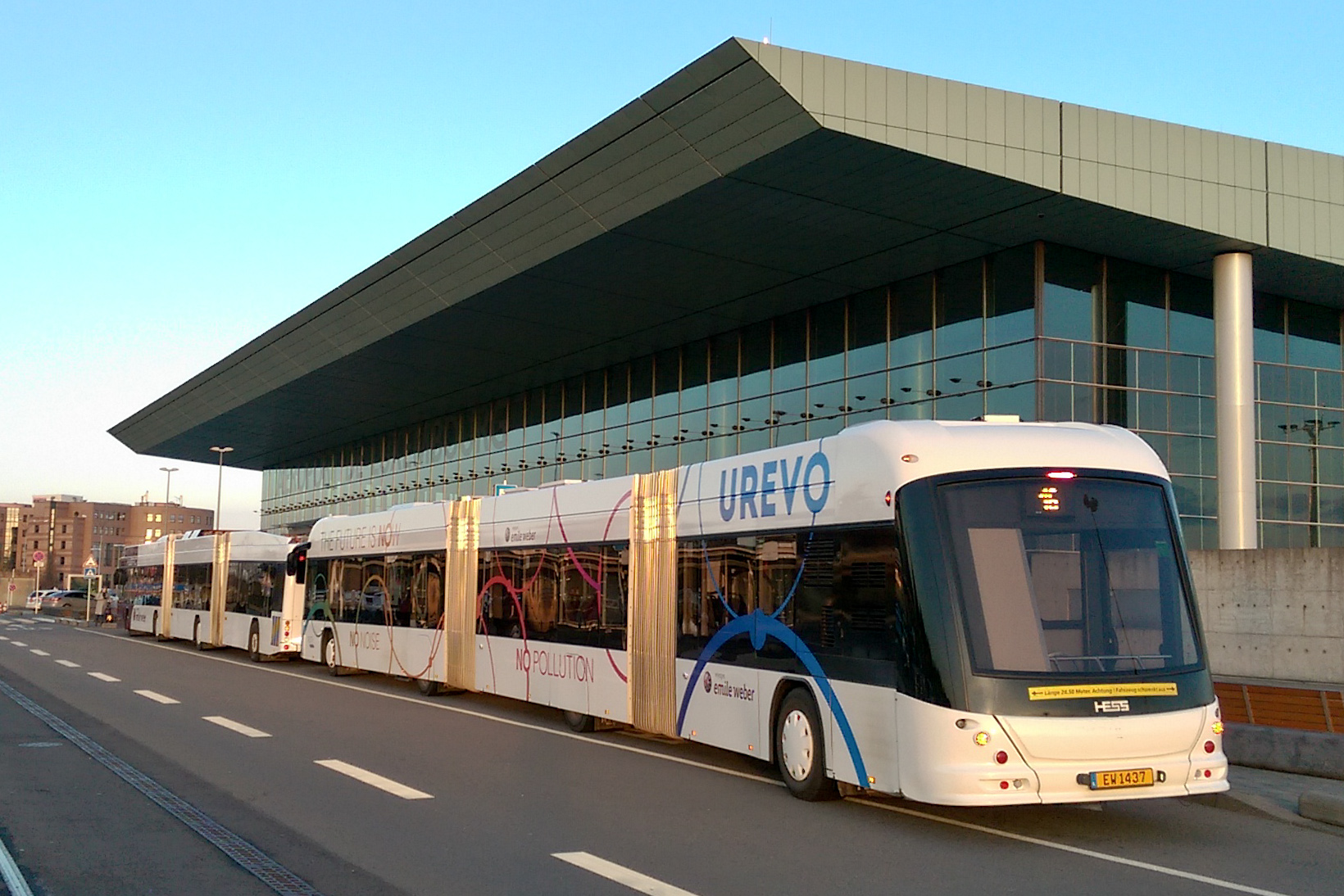 Zwei Hess LighTram Hybrid Doppelgelenkbusse des Busunternehmens Émile Weber am Flughafen Luxemburg-Findel. Rechts der Wagen EW 1437 mit tramähnlicher schräger Front- und Heckgestaltung und Aufschrift "UREVO" (urban evolution), links der ältere Wagen EW 1441 in klassischer Bus-Optik.